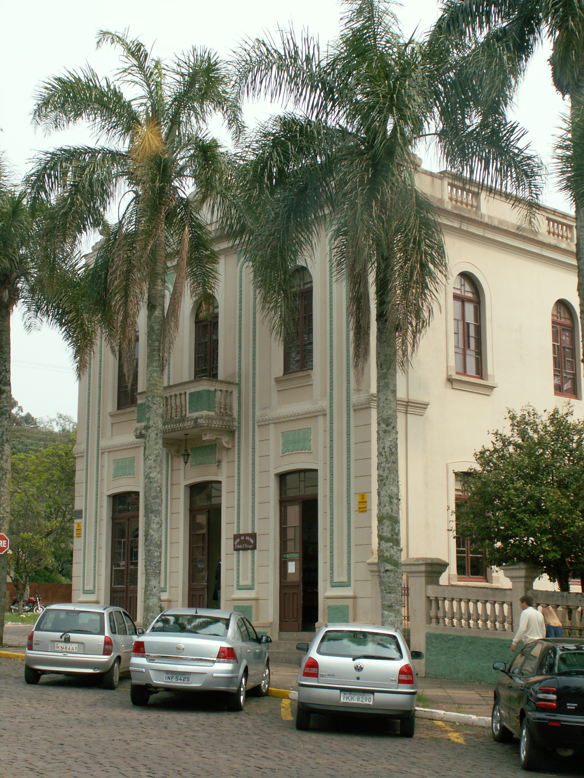 Prédio da Casa de Cultura do município brasileiro de Nova Prata, no Rio Grande do Sul